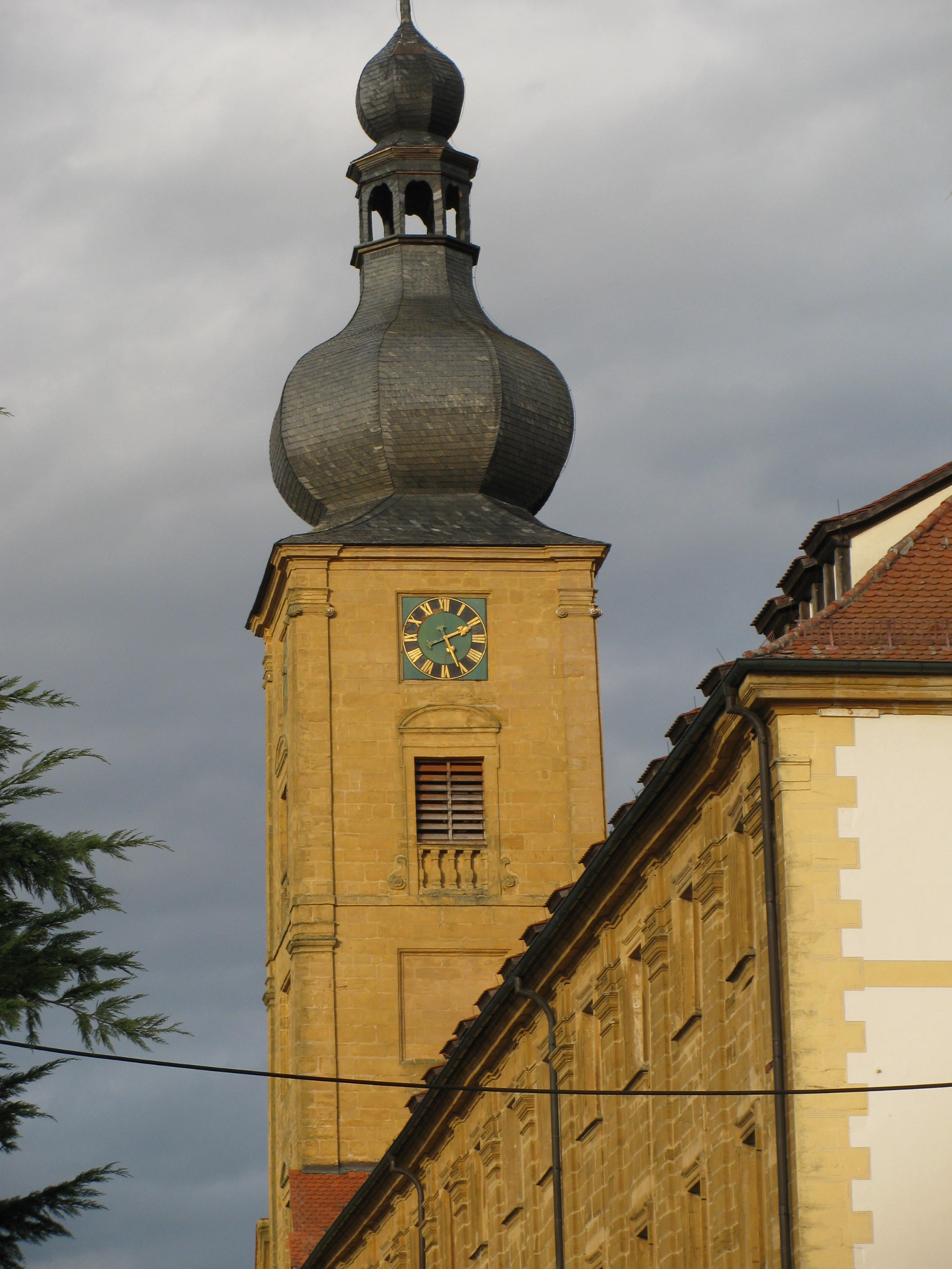 Kloster Weißenohe, Abtsflügel